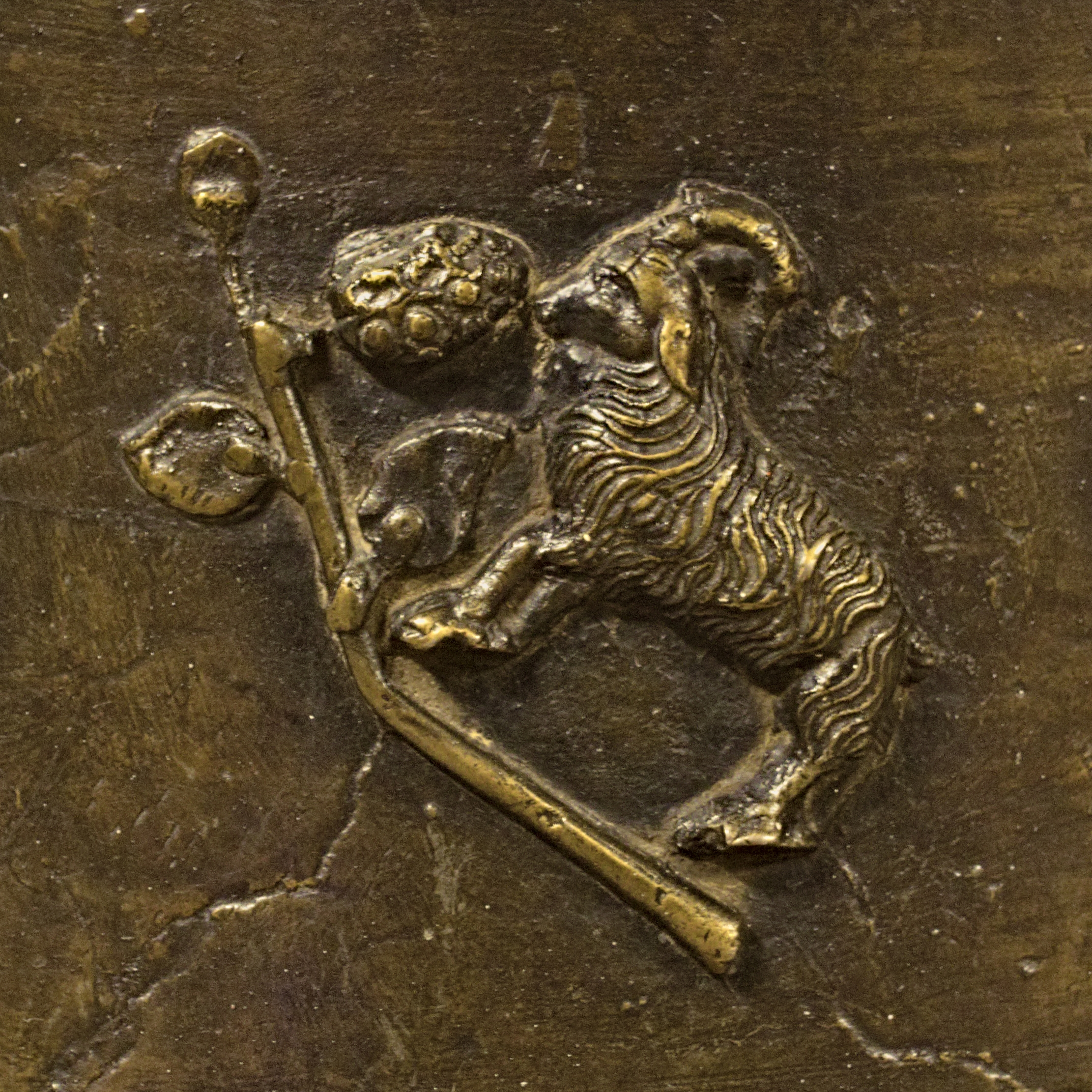 kozioł wspinający się na winorośl (symbol Lublina), detal na dzwonie odlanym w 1585 roku w Lublinie, który był umieszczony w Bramie Krakowskiej, uległ uszkodzeniu w 1944 roku; wystawa w Bramie Krakowskiej w Lublinie